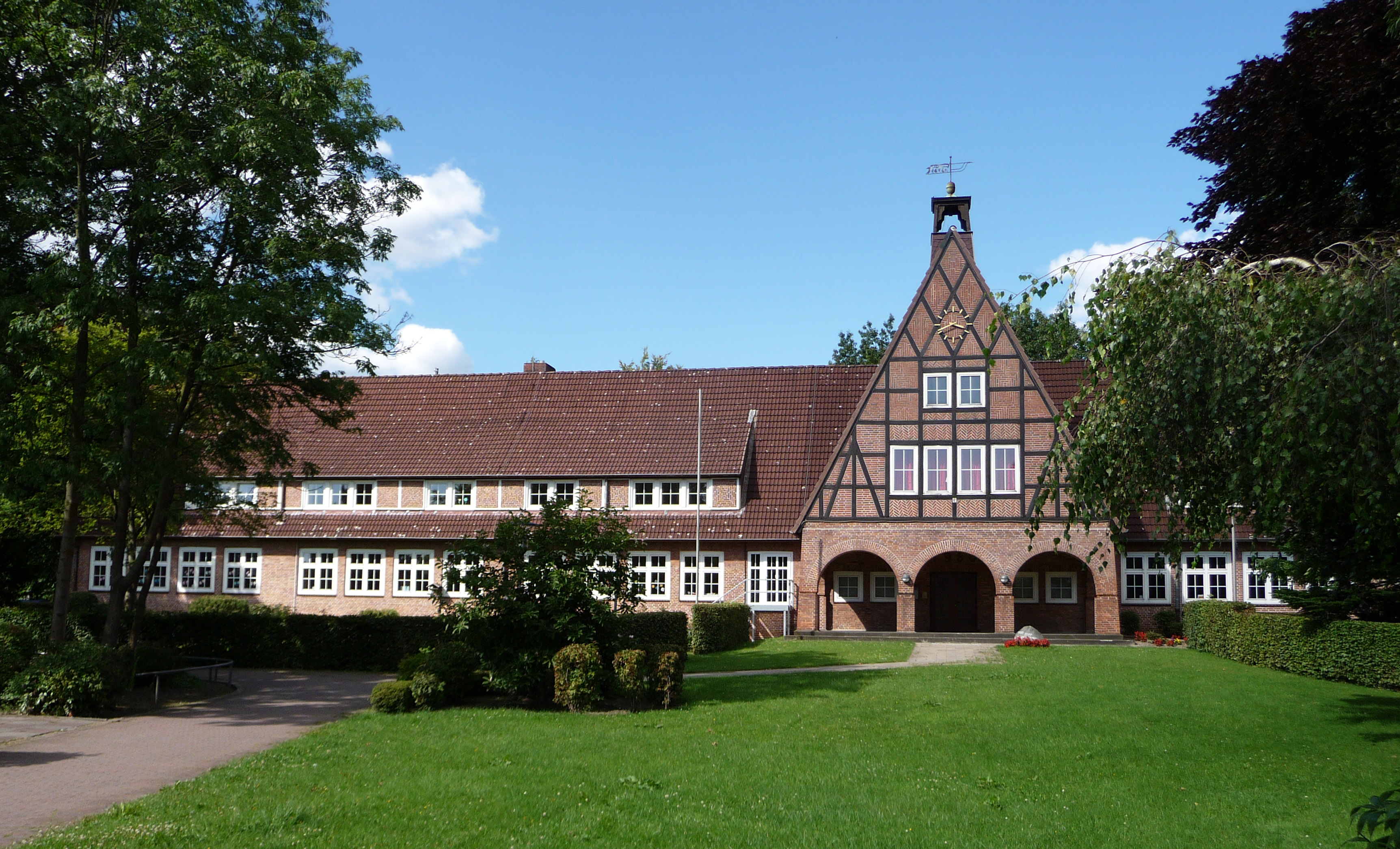 Grundschule (Peter-Lunding-Schule) in Hasloh, erbaut 1950